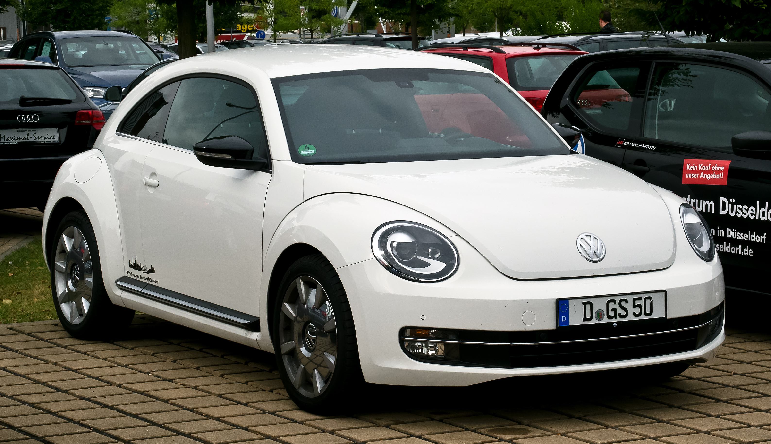 VW Beetle Sport